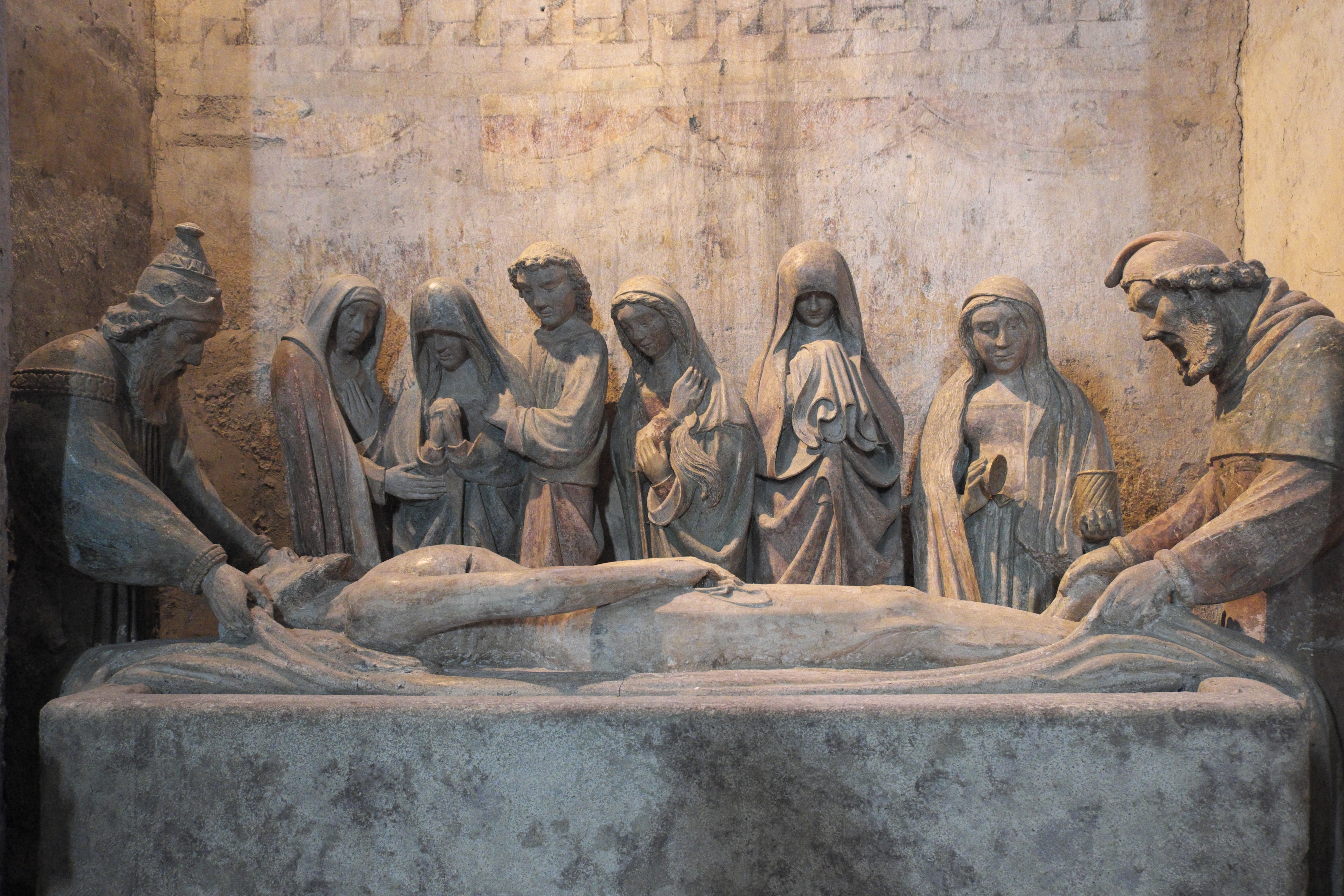 Katholische Pfarrkirche, ehemalige Stiftskirche, Saint-Cerneuf in Billom im Département Puy-de-Dôme (Auvergne-Rhône-Alpes), Grablegungsgruppe aus der ersten Hälfte des 16. Jahrhunderts